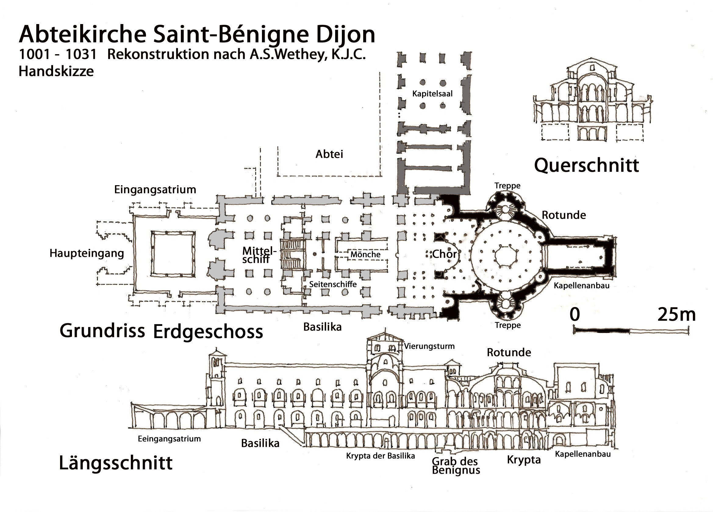 Saint-Bénigne, Dijon, Rekonstruktion